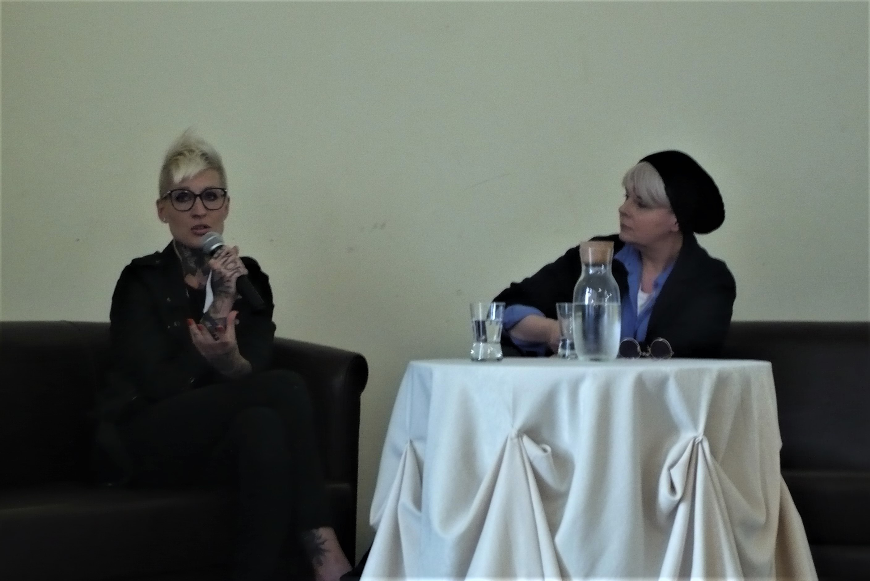 Katarzyna Puzyńska i Karolina Korwin-Piotrowska, Festiwal Góry Literatury, Zamek Książ, 14.07.2019